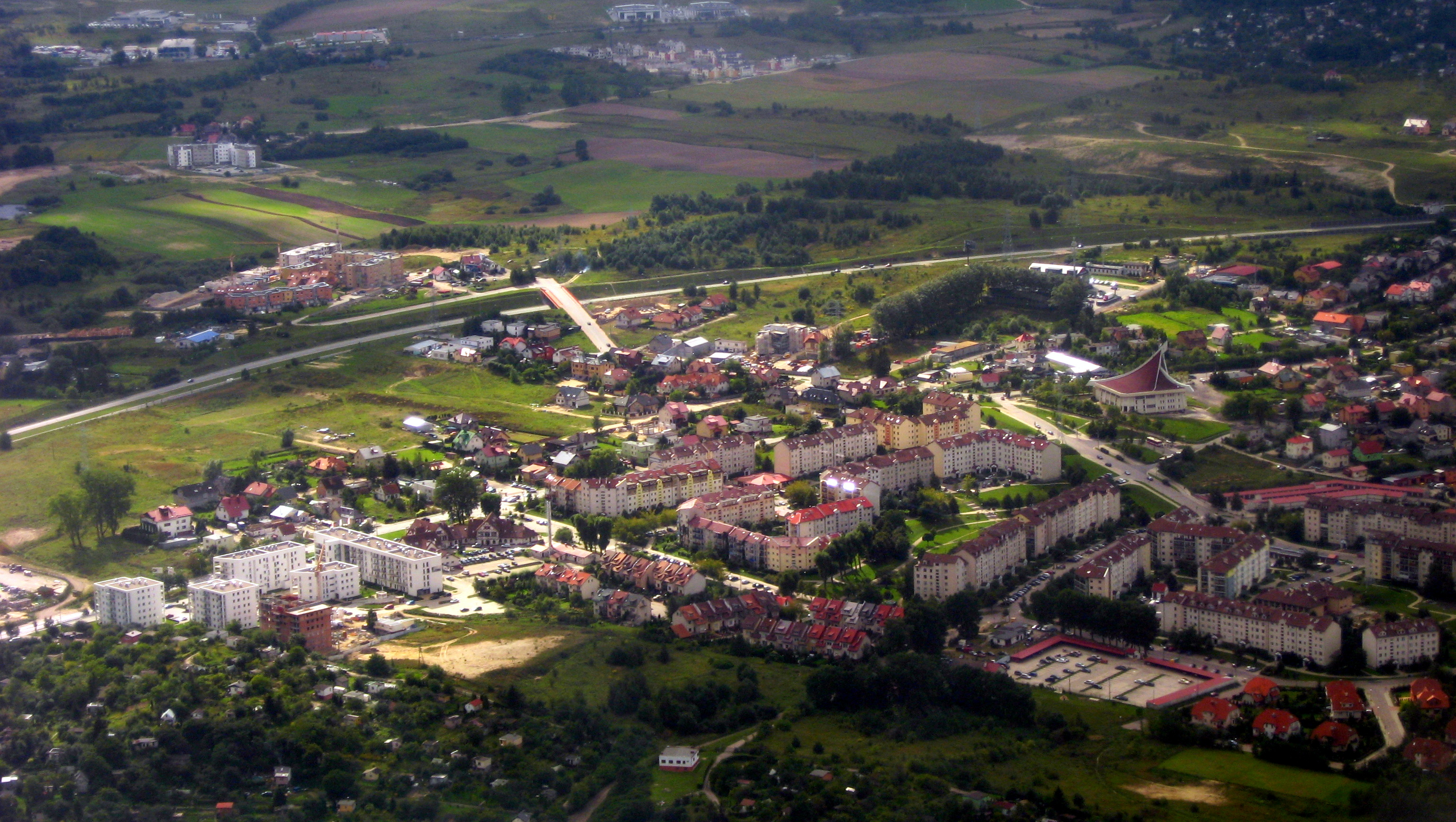 Gdańsk Jasień i okolica. Zdjęcie lotnicze.